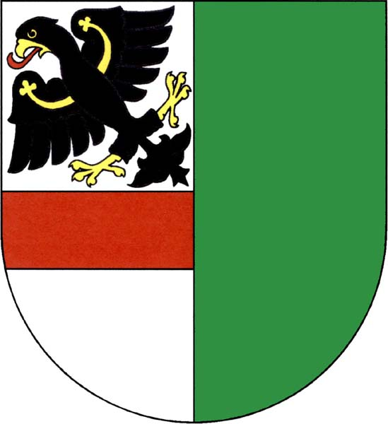 Znak obce Vysoká Pec v okrese Chomutov